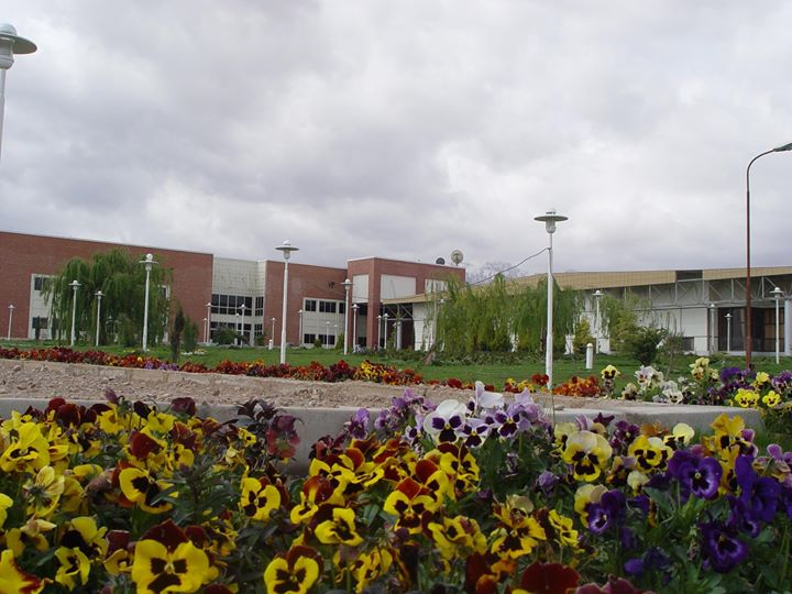 Kerman Graduate University of Technology